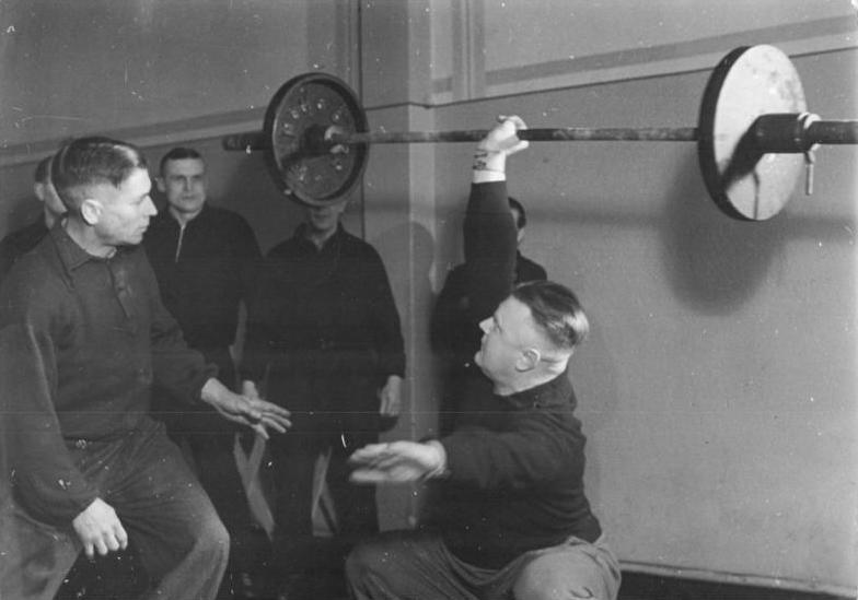 Fritz Lorenz beim Training Zentralbild Biscan Zi-Be. 15.8.1952 Meister seines Berufs - Meister im Sport. Fritz Lorenz, Dachdeckermeister in Calbe - Sachsen, ist nicht nur ein Meister seines Berufes, sondern auch gleichzeitig einer der besten Schwerathleten Deutschlands, Titelhalter von acht DDR-Rekorden und einem gesamtdeutschen Rekord. Für die Weltfestspiele trainierte er mit dem sowjetischen Schwerathleten, Sascha Bucharow, die deutsche Schwerathletik-Staffel. Lorenz hat von seinem sowjetischen Kollegen viel gelernt und vermittelt seine Kenntnisse nun der BSG "Motor" Magdeburg, der erfolgrichsten Betriebssportgemeinschaft (BSG) . UBz: Fritz Lorenz reißt hier 55 Kilo einarmig rechts. Einmalig links hat er einen neuen gesamt-deutschen Rekord aufgestellt; nun versucht er, auch recht seine Leistung zu steigern.